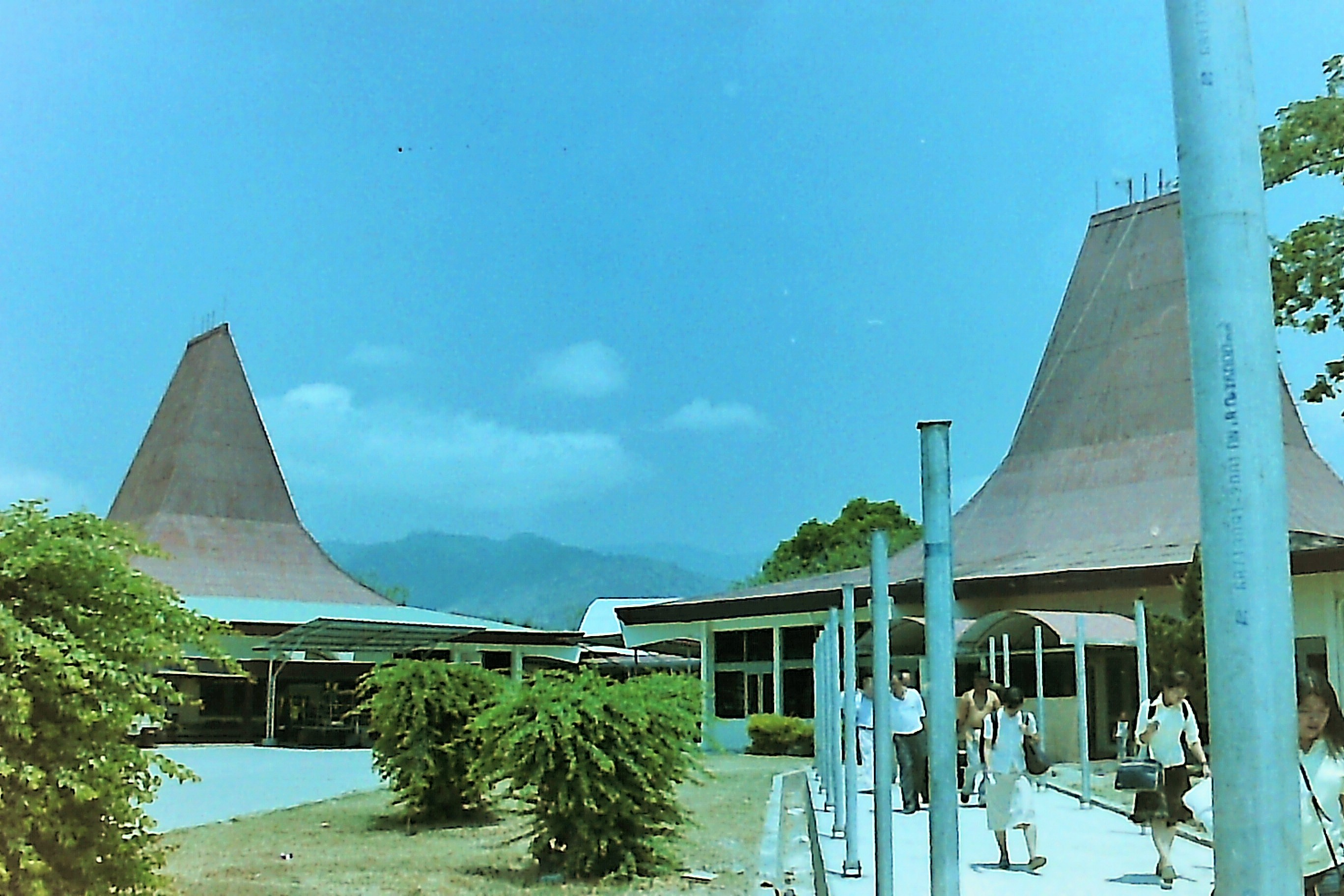 東ティモールの空の玄関口であるディリ国際空港 2007年9月訪問時撮影（フィルムスキャナーでネガをデジタル画像化）